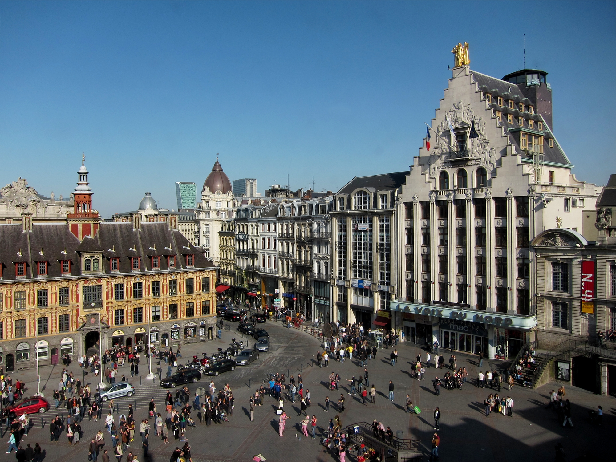 La place du Général de Gaulle, ou Grand Place, à Lille (Nord).